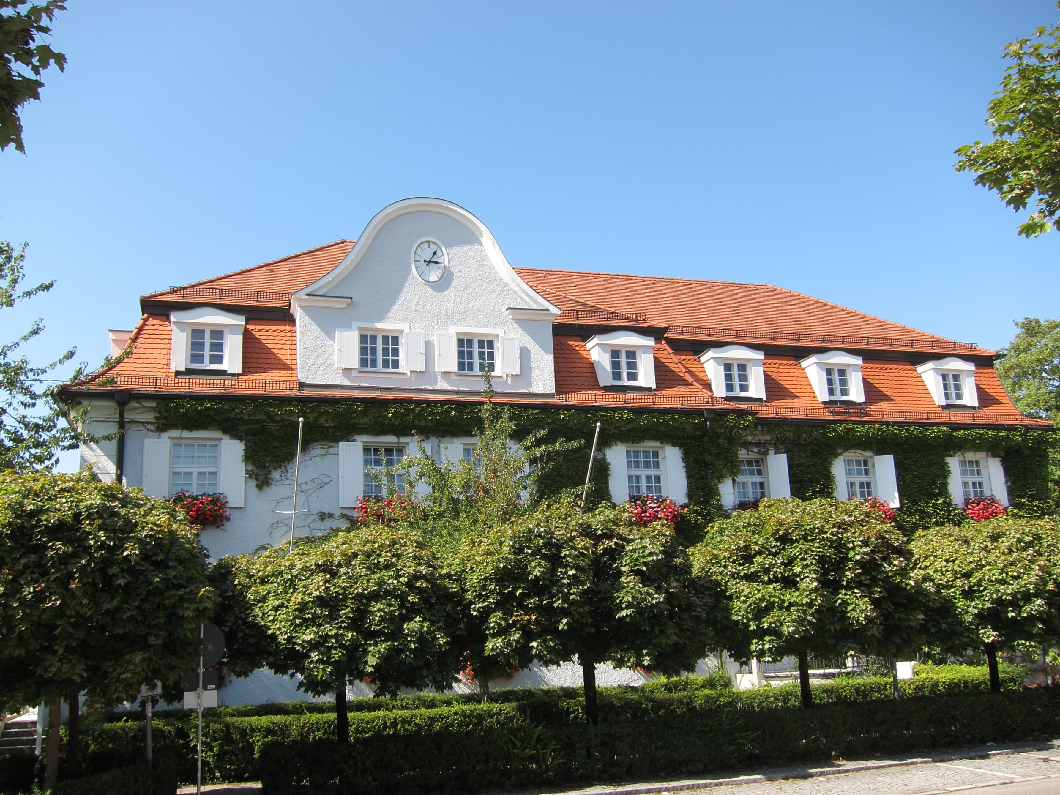 Bahnhofstraße 7; ursprüngliches Rathaus, zweigeschossiger Putzbau, Mansardwalmdach und Zwerchgiebel, 1915.